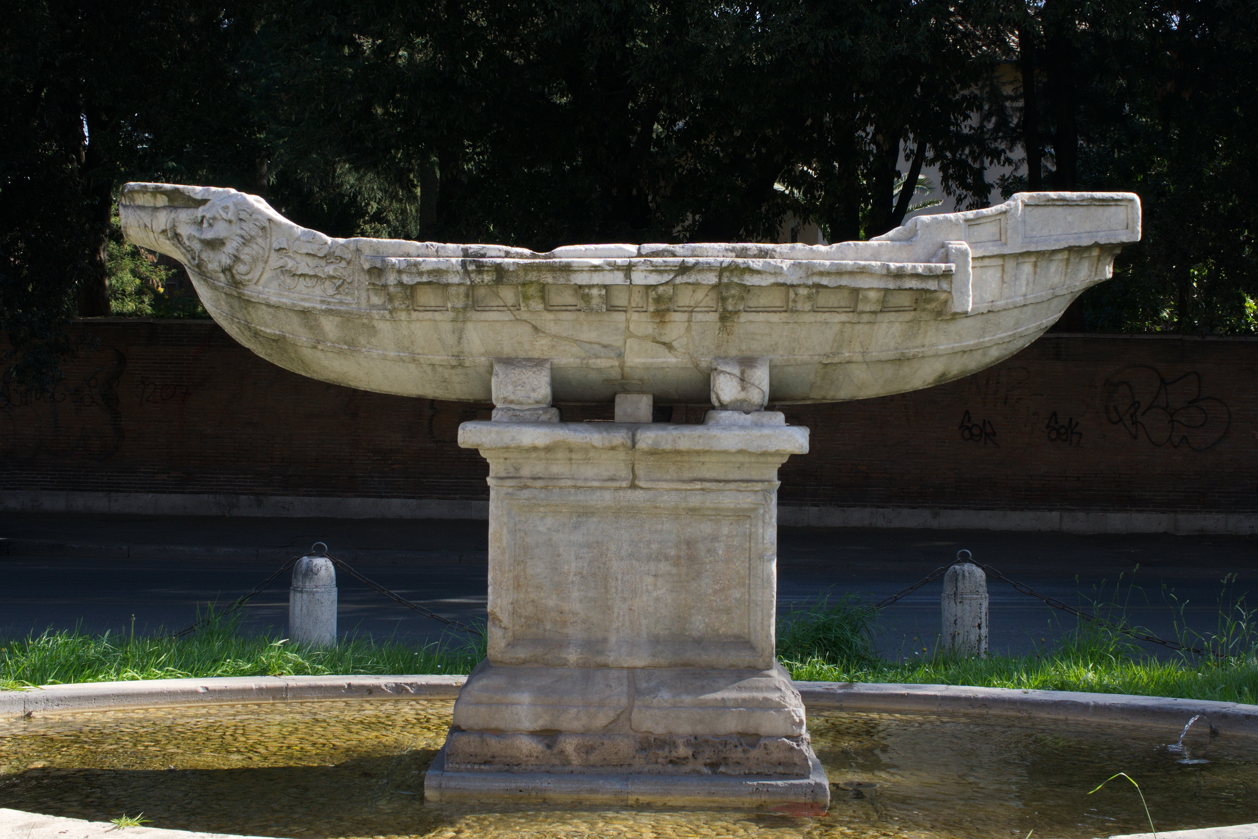 Fontana della Navicella, Roma This is a photo of a monument which is part of cultural heritage of Italy.